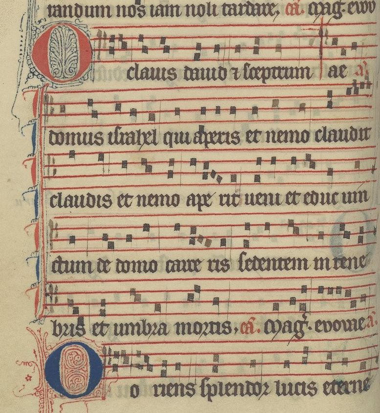 Antienne O Clavis ; Antiennes de l'Avent, Maître du Méliacin Antiphonaire dominicain. Ordre des Prêcheurs . Date d'édition : 1300 Source Gallica Bnf